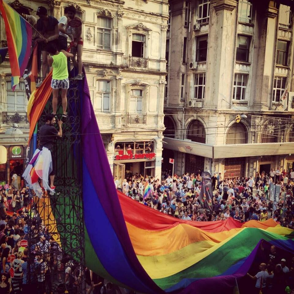 Geleneksel İstanbul Onur Yürüyüşü kuleye Gökkuşağı Bayrağı asma etkinliği, Gey Onur Yürüyüşü 2013.